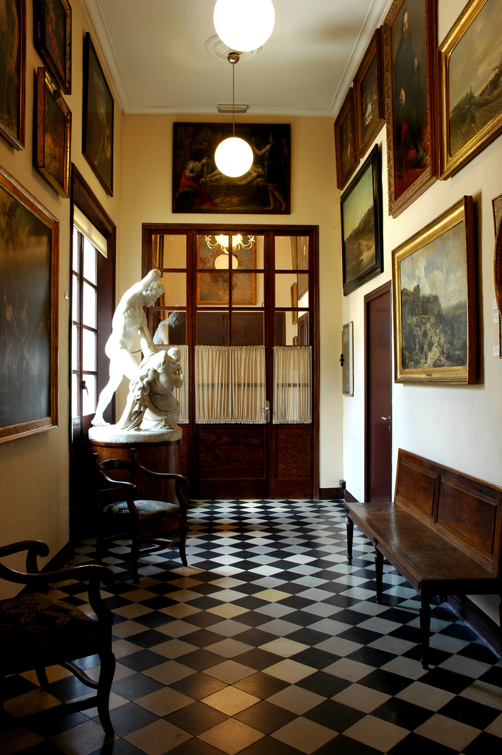 Passadís d'entrada a l'Acadèmia